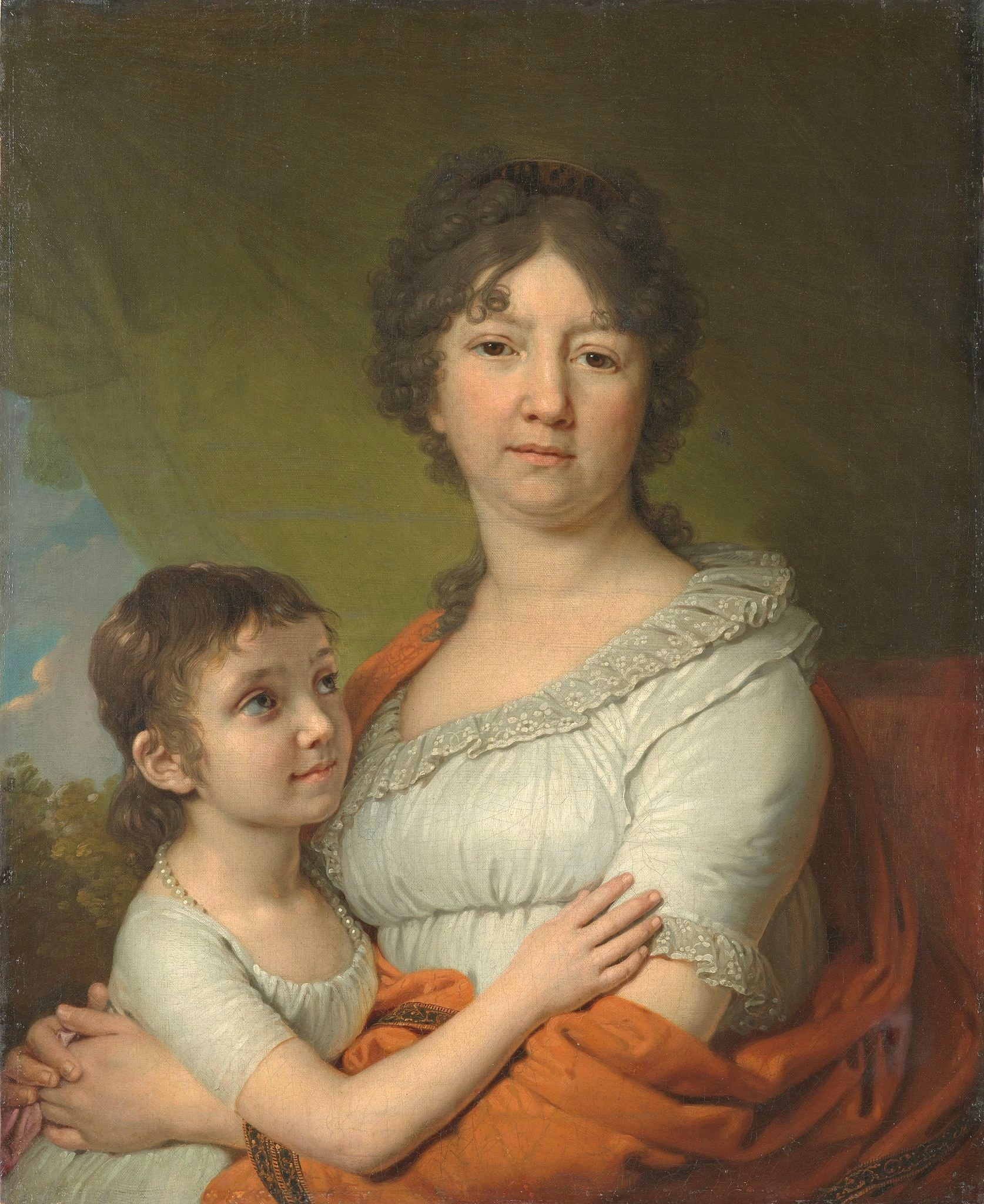 Лабзина Анна Евдокимовна (1758-1828), урожденная Яковлева, в первом браке была замужем за А.М.Карамышевым, во втором - за А.Ф.Лабзиным